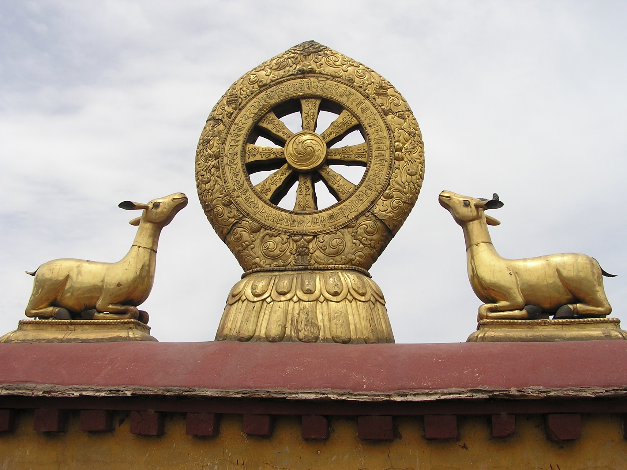 Jokhang Monastery 15.